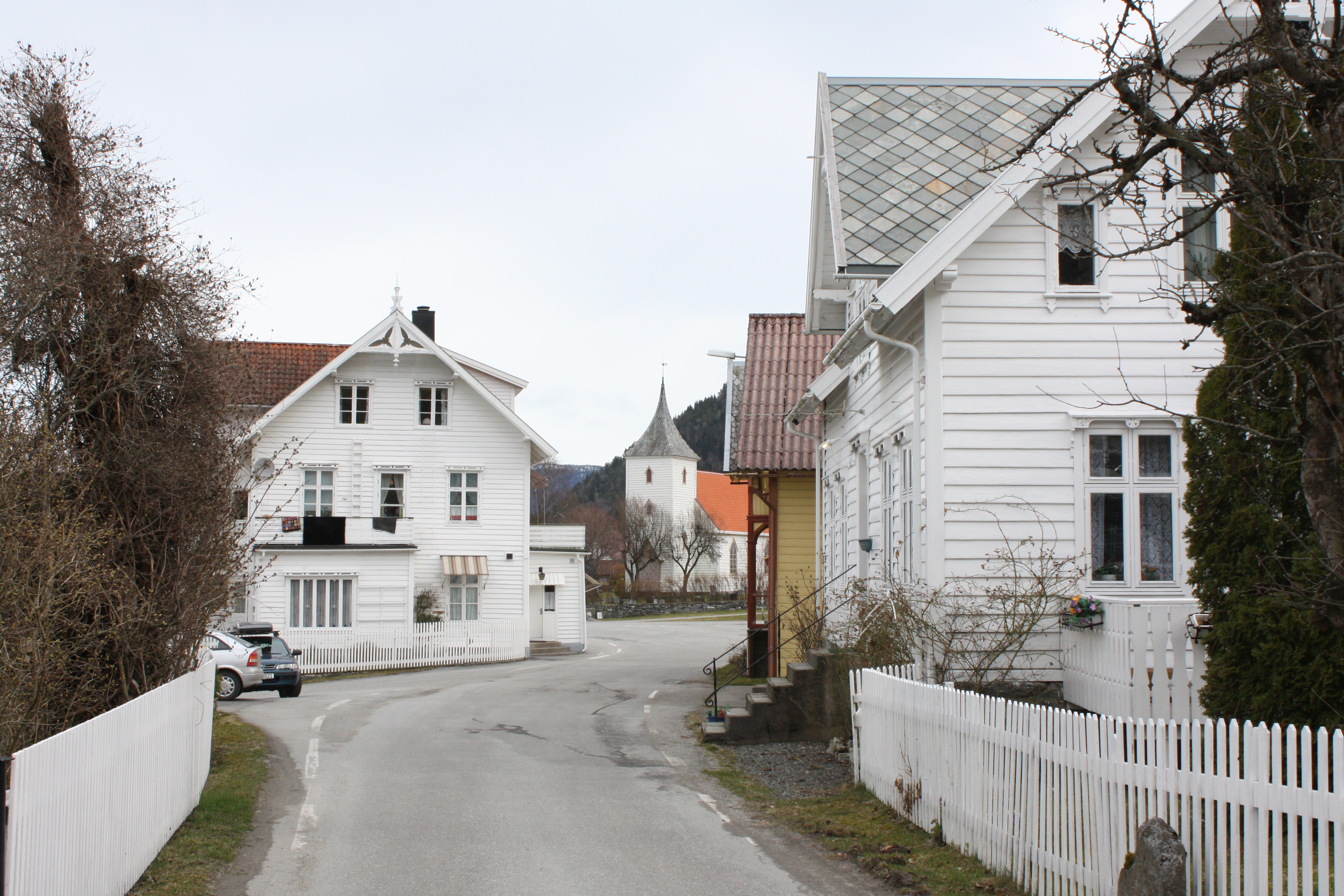 Sentrum av Utvik med kirken og det gamle hotellet.